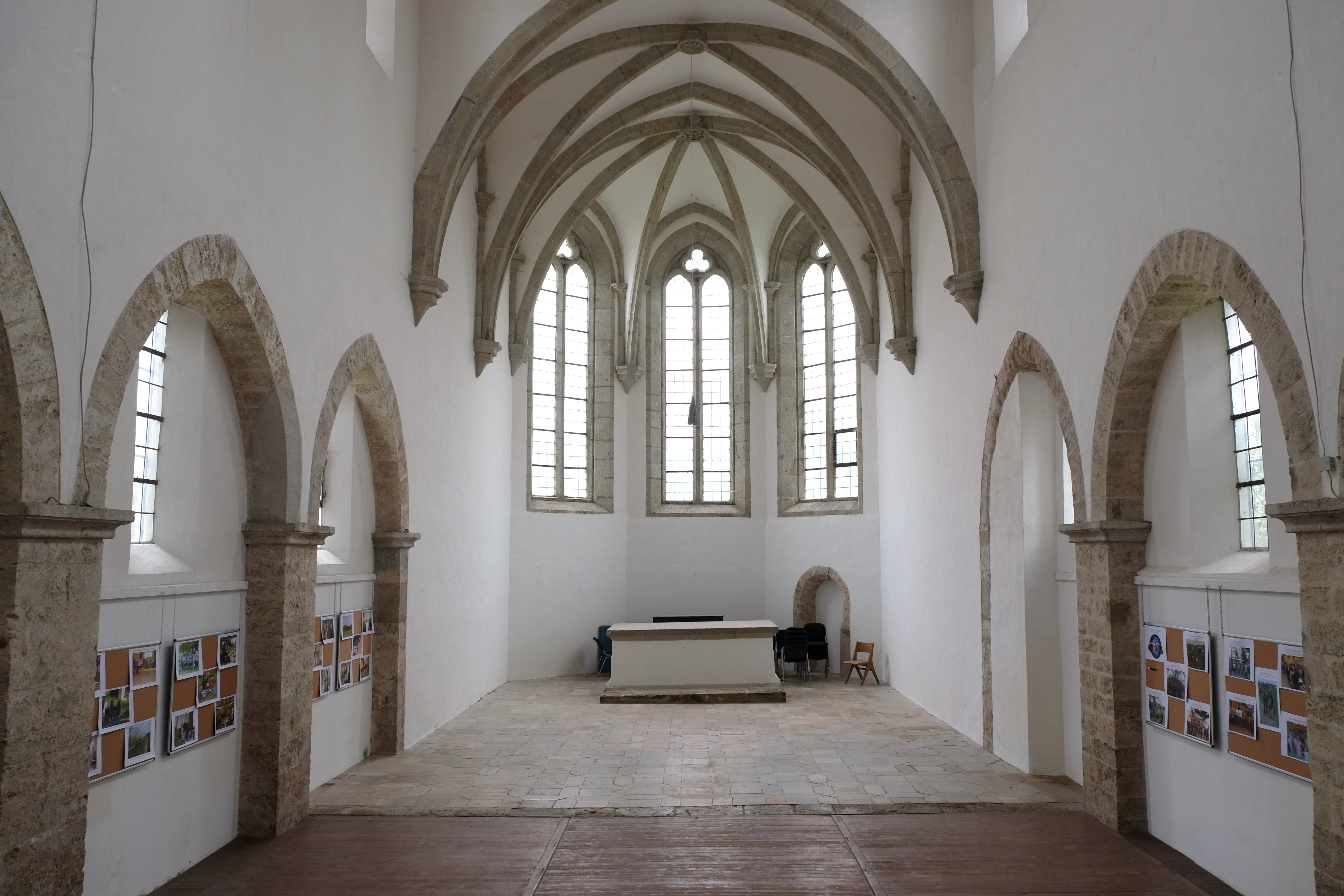 Kirche in Kloster Zimmern im Landkreis Donau-Ries (Bayern, Deutschland)